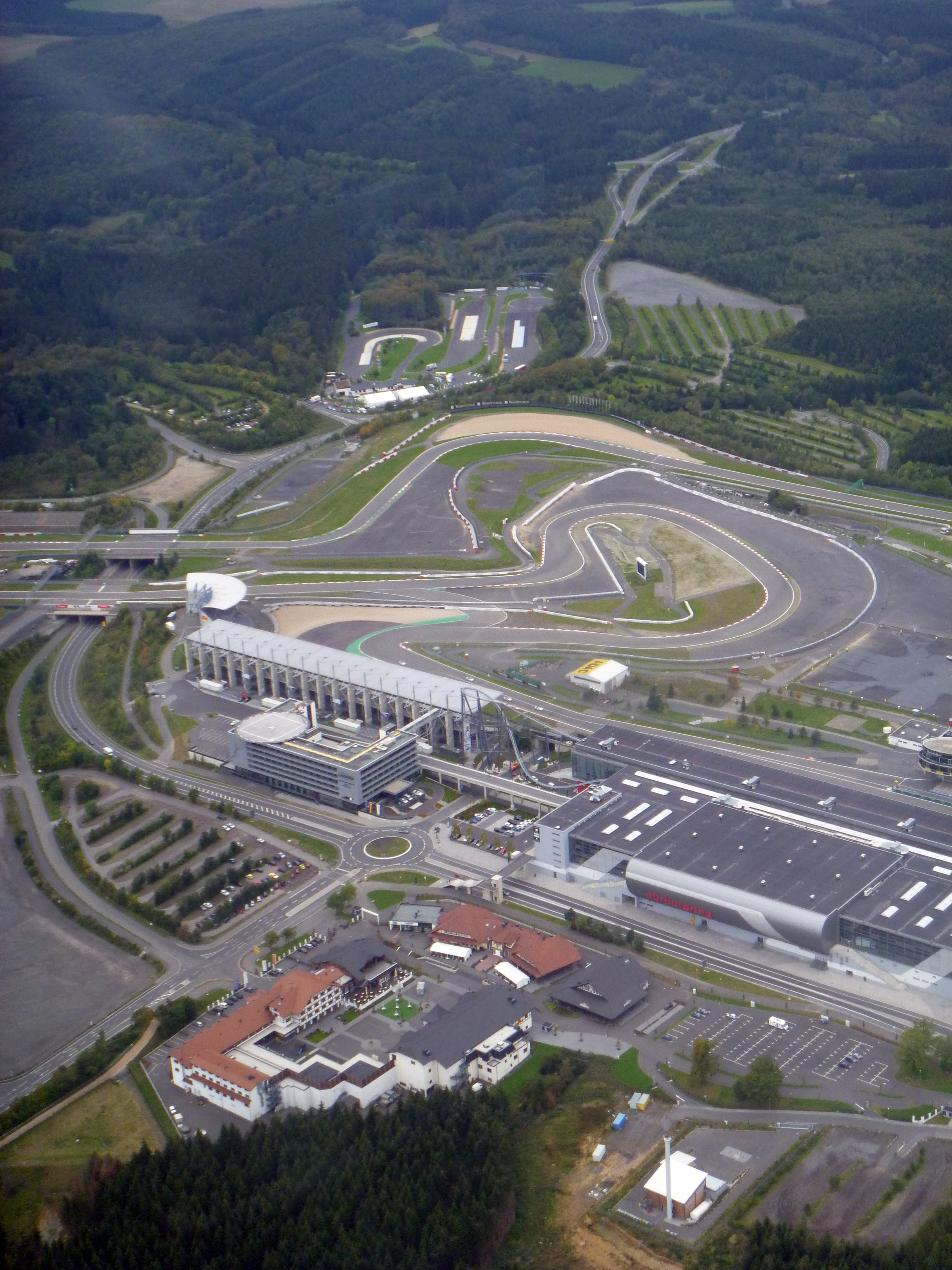 Luftaufnahme vom Nürburgring